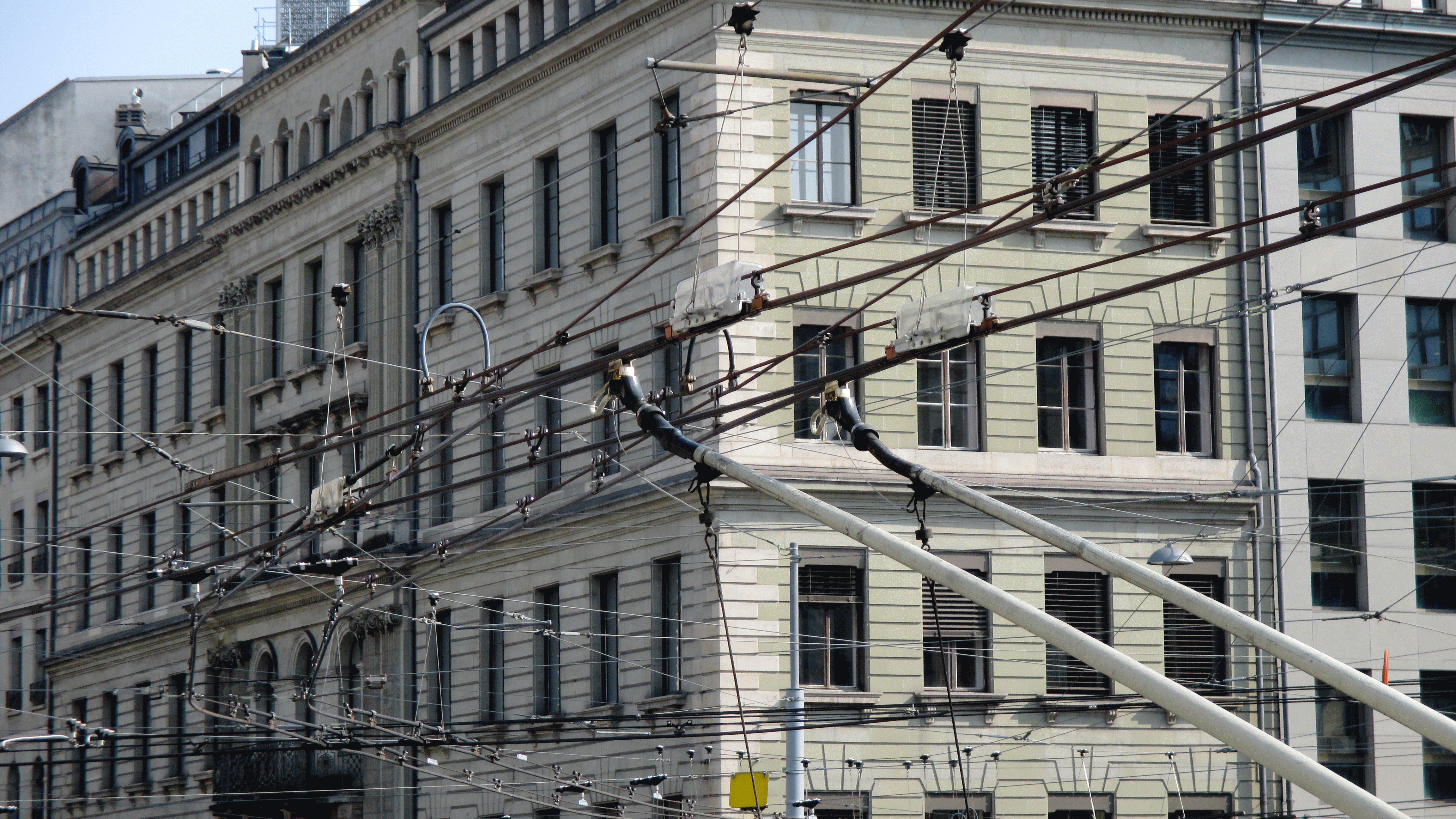 Ligne aérienne TPG